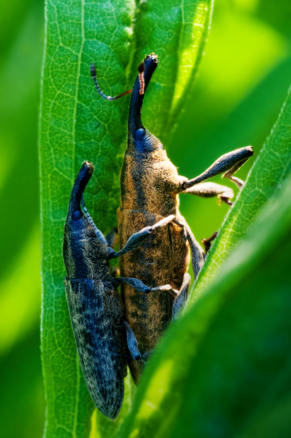 Фрачники брачуются